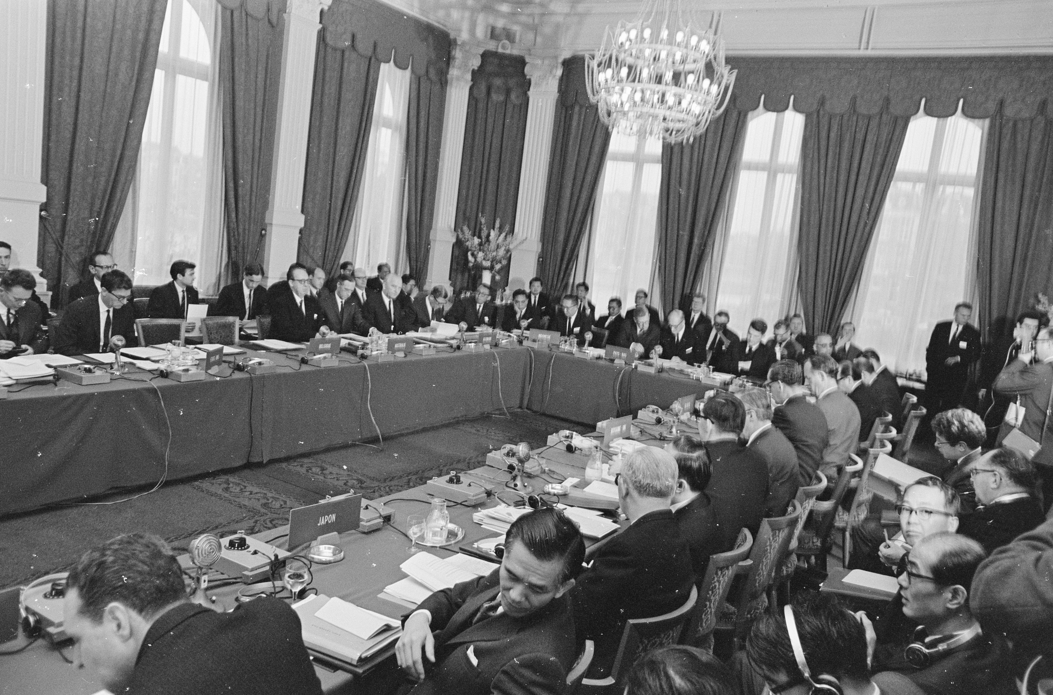 Collectie / Archief : Fotocollectie Anefo Reportage / Serie : [ onbekend ] Beschrijving : Opening Intergouvernemente conferentie over Indonesie in Amstelhotel, overzichten Datum : 23 februari 1967 Locatie : Amsterdam, Indonesië, Indonesië Trefwoorden : conferenties Instellingsnaam : Amstelhotel Fotograaf : Nijs, Jac. de / Anefo Auteursrechthebbende : Nationaal Archief Materiaalsoort : Negatief (zwart/wit) Nummer archiefinventaris : bekijk toegang 2.24.01.05 Bestanddeelnummer : 920-1035